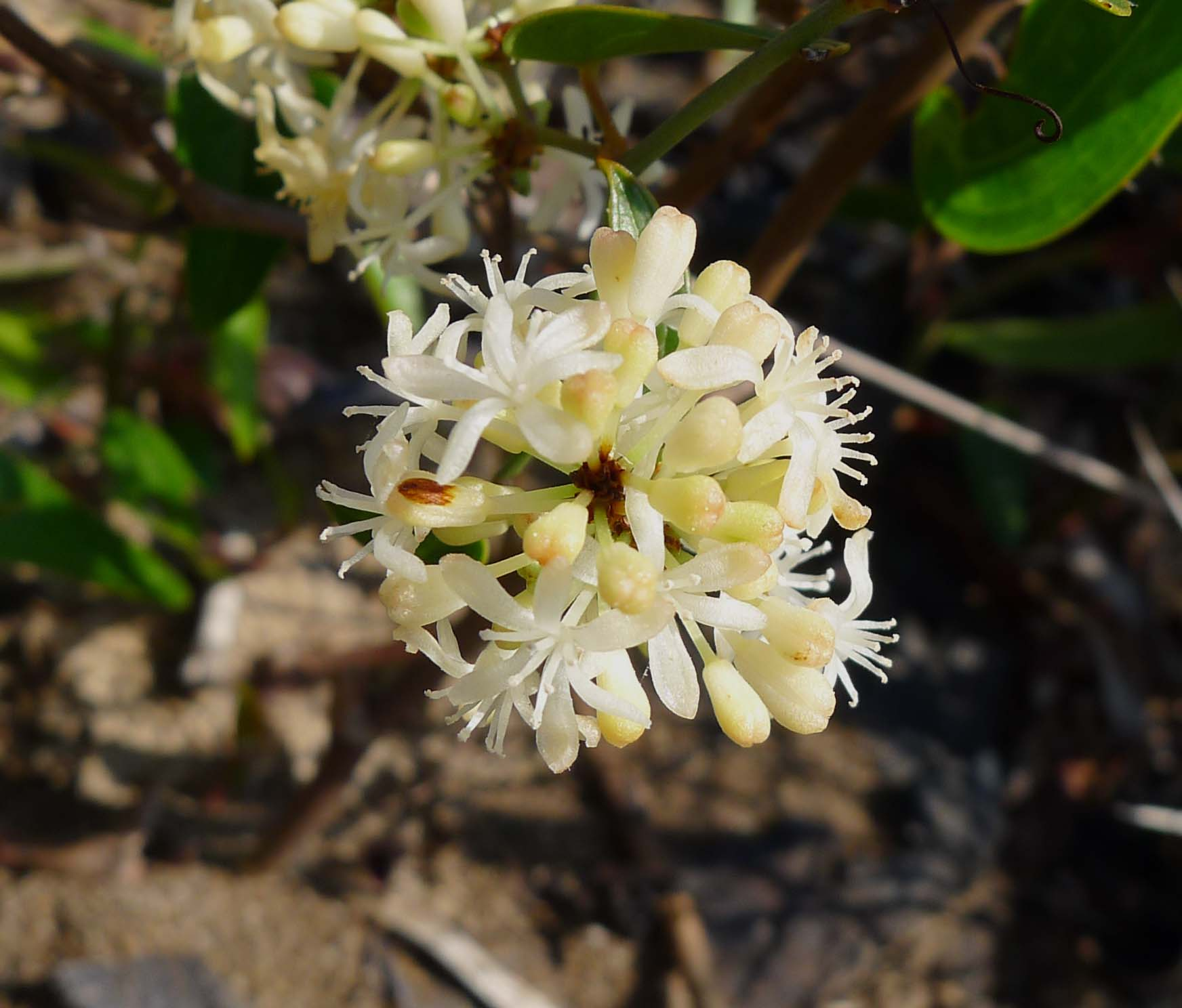 Jimena, Andalucia, Spain